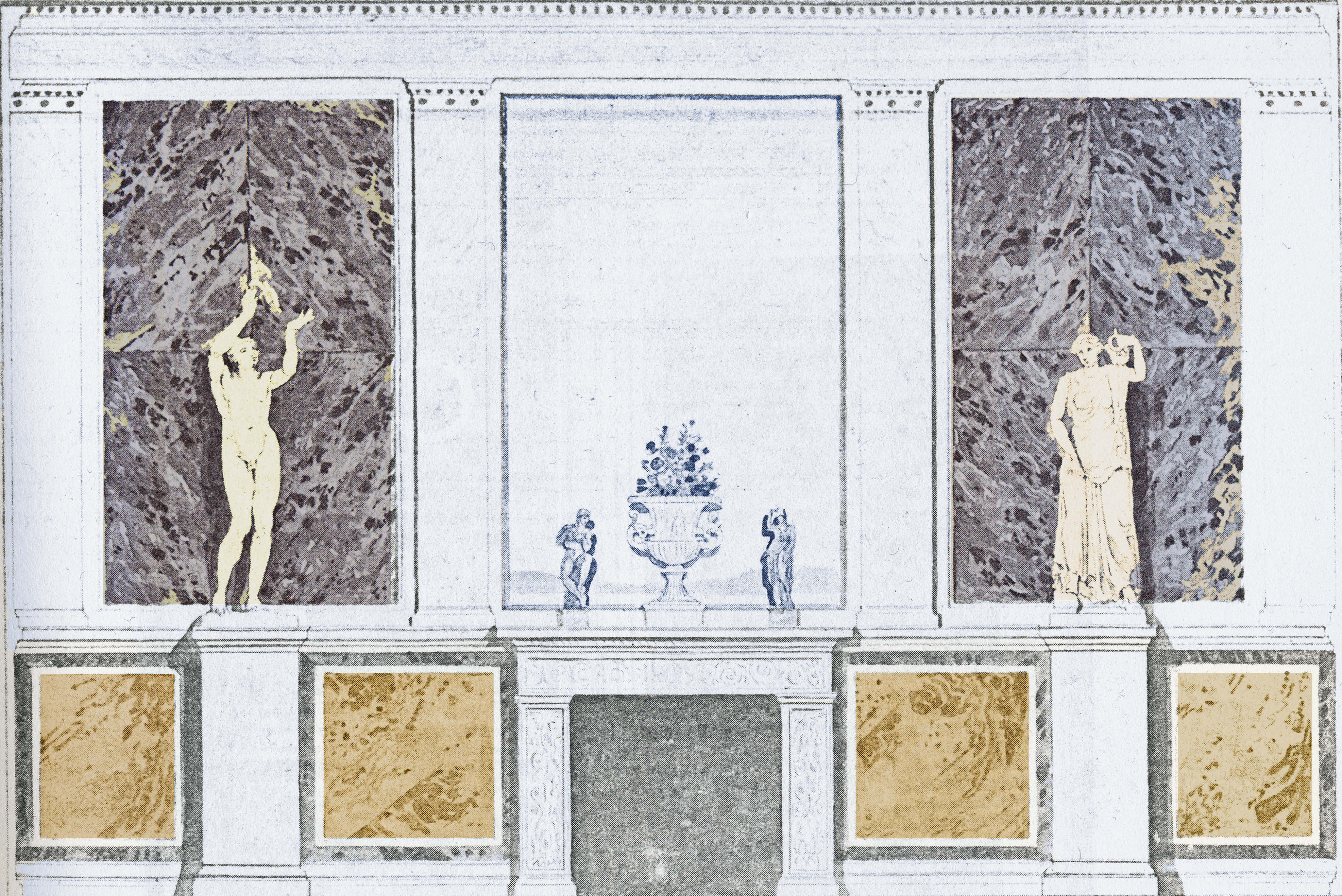 Ostwand des Saales im Casino (Entwurf Schinkel, 1825)